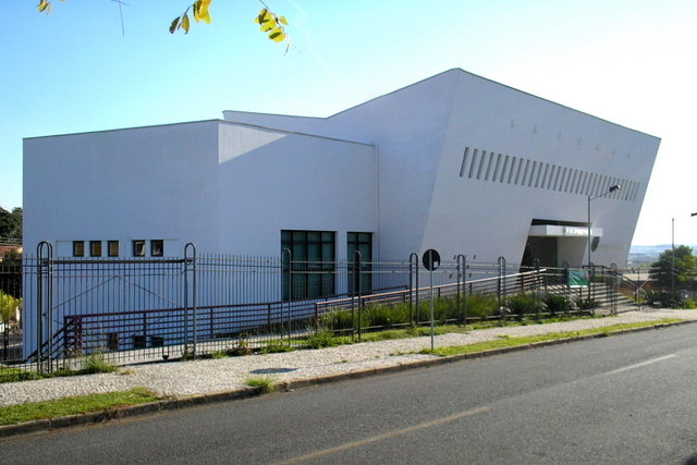 Centro Cultural Wanda dos Santos Mallmann em Pinhais (Grande Curitiba), PR, Sul do Brasil.